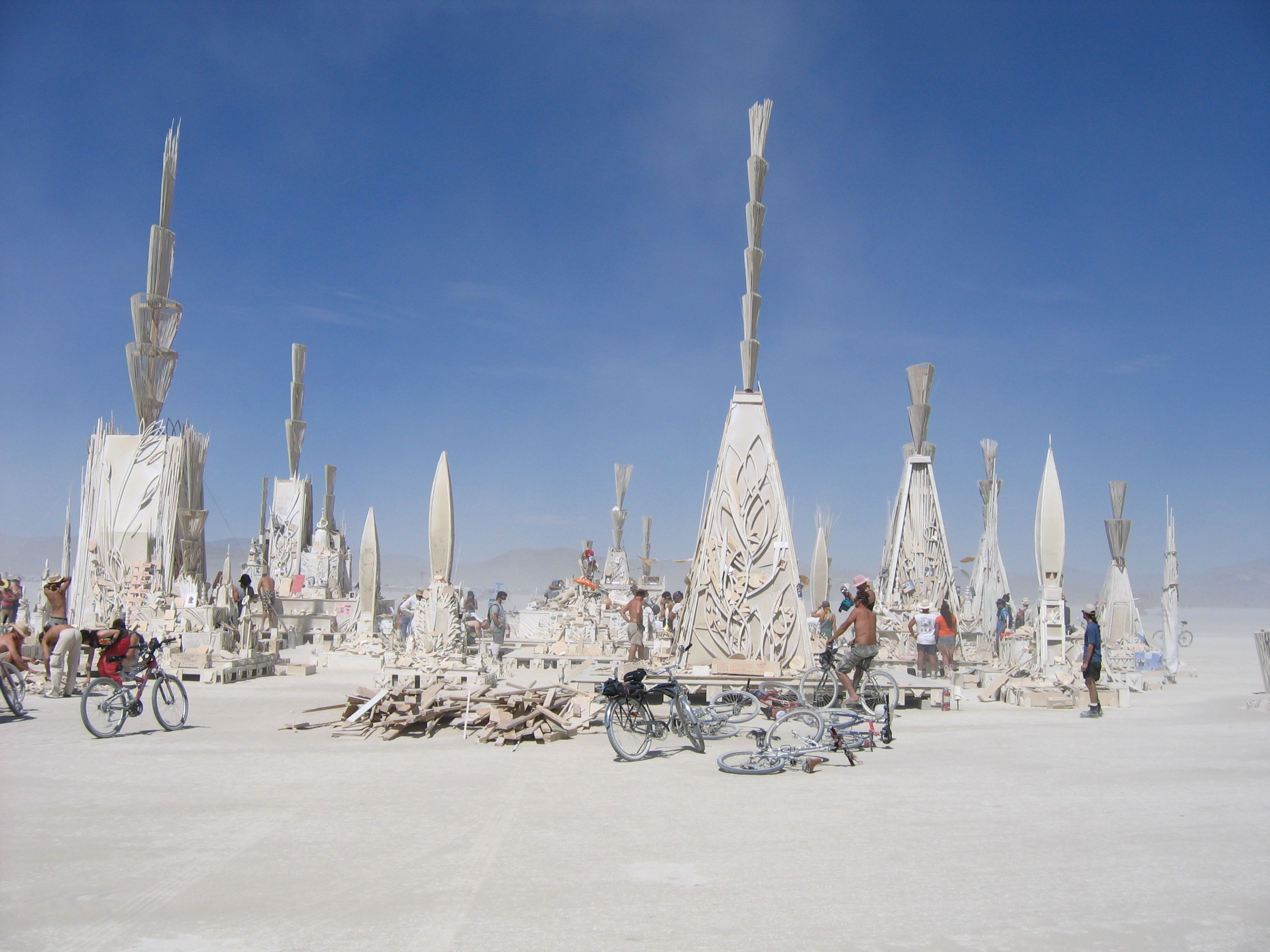 Храм на Burning Man (2006 г.)